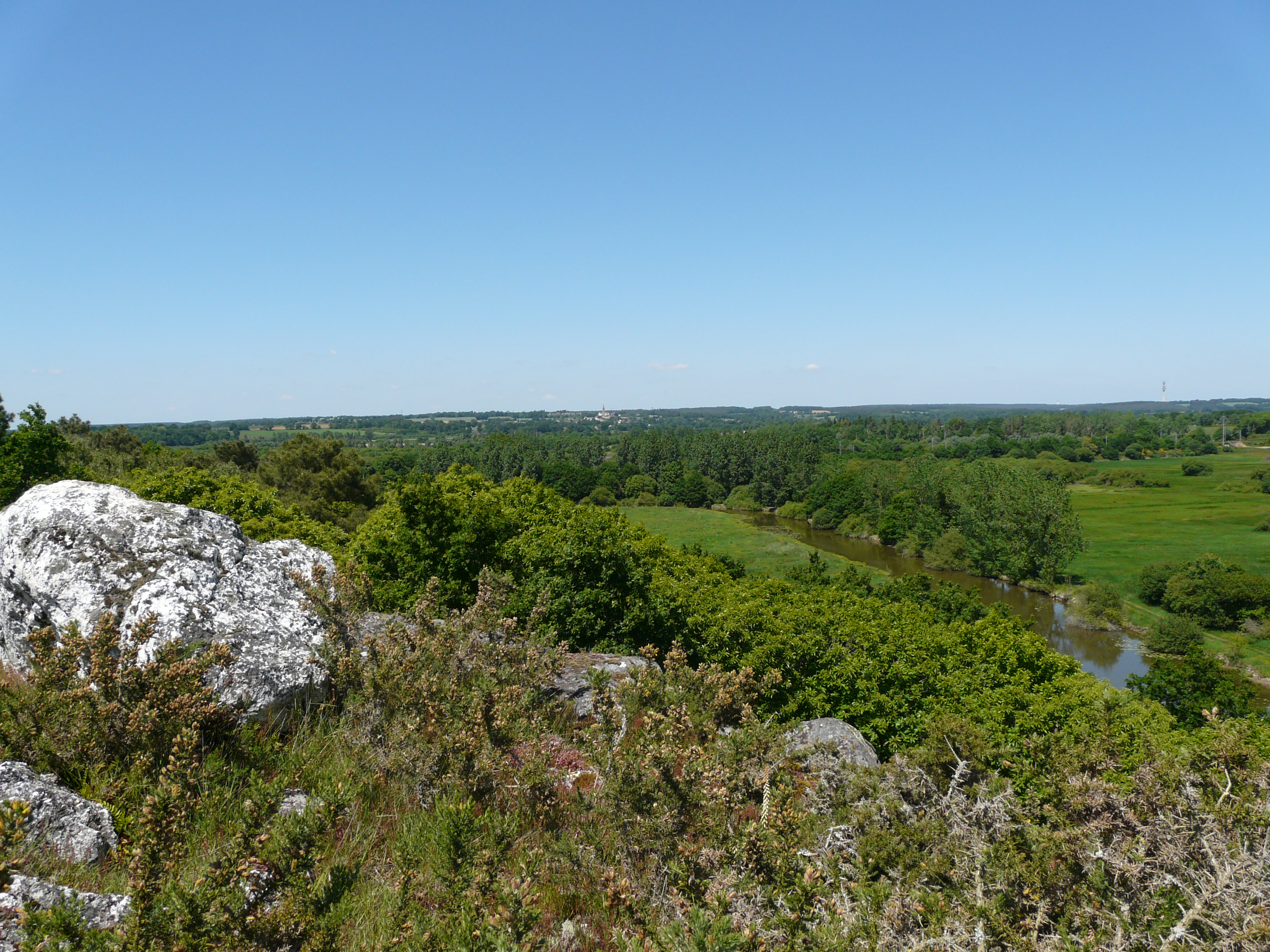 Rocher du veau (Avessac) et Lac de Murin (Masserac)